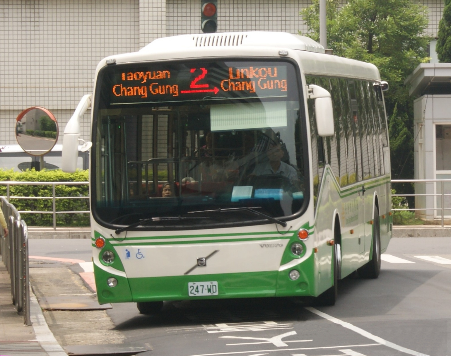 汎航通運VOLVO B7R低底板公車247-WD。